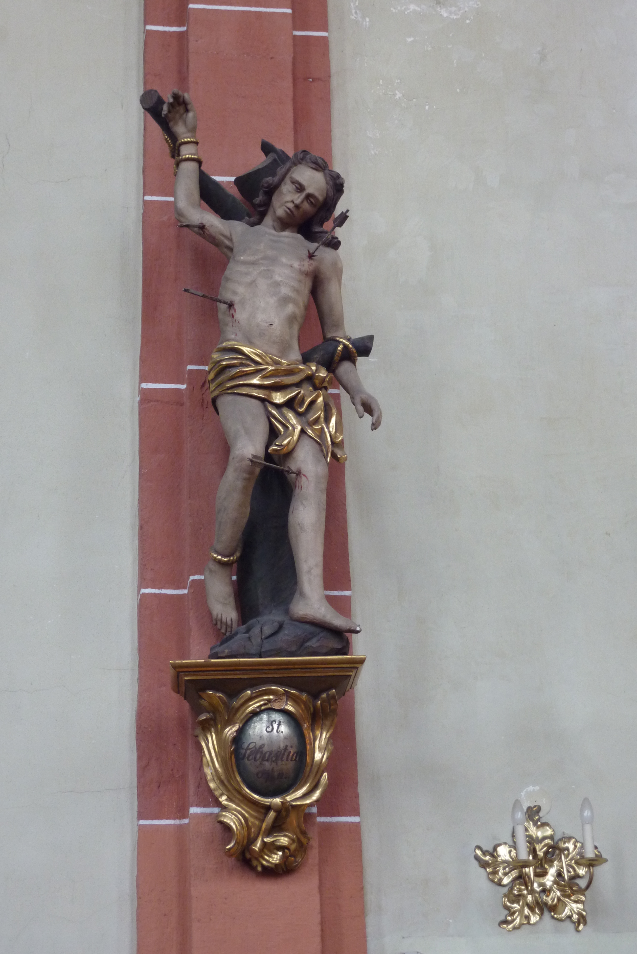 Niederbreisig, Ortsteil von Bad Breisig, Katholische Kirche St. Marien, Skulptur des hl. Sebastianus